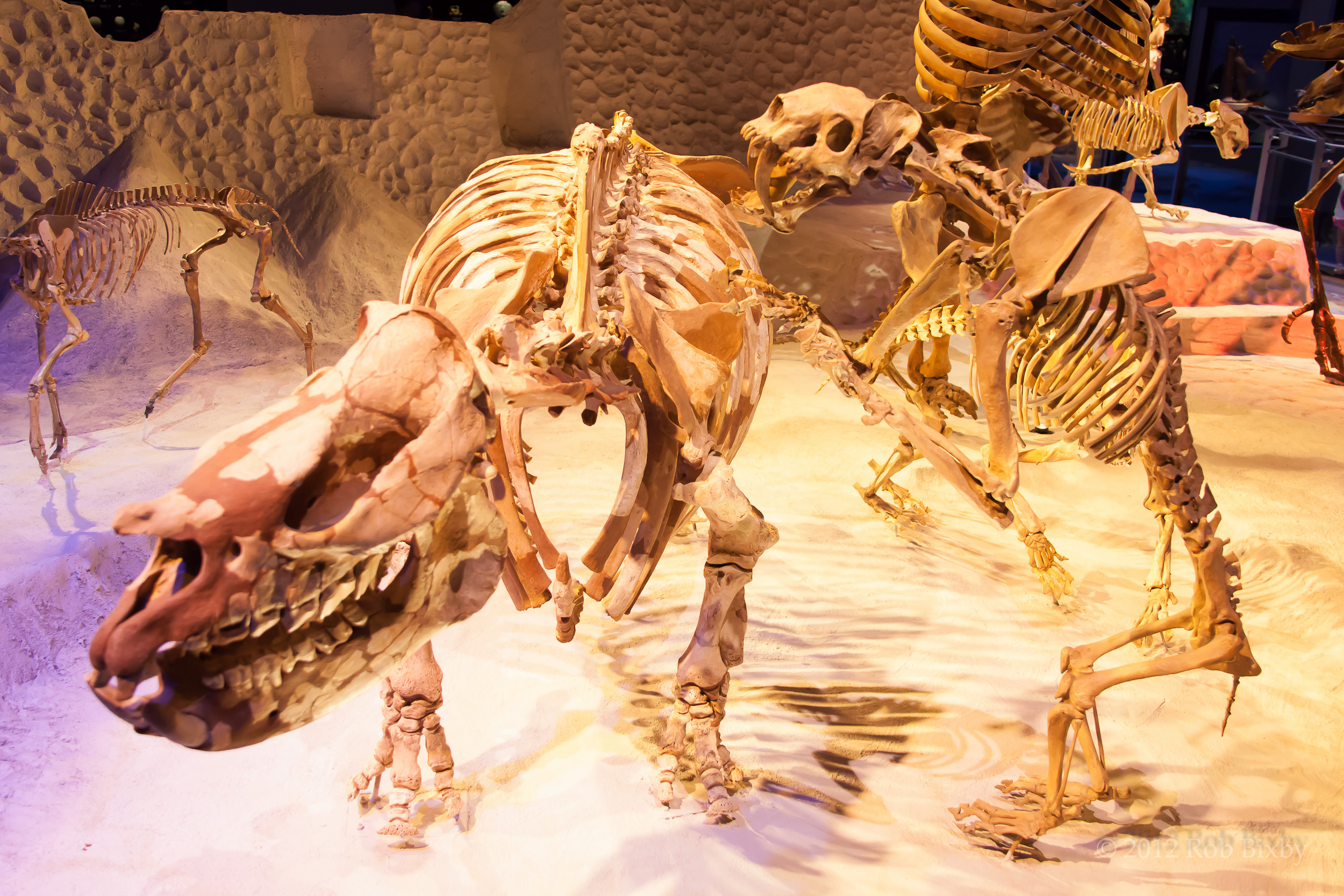 Gainesville_9-2-13-8695.jpg